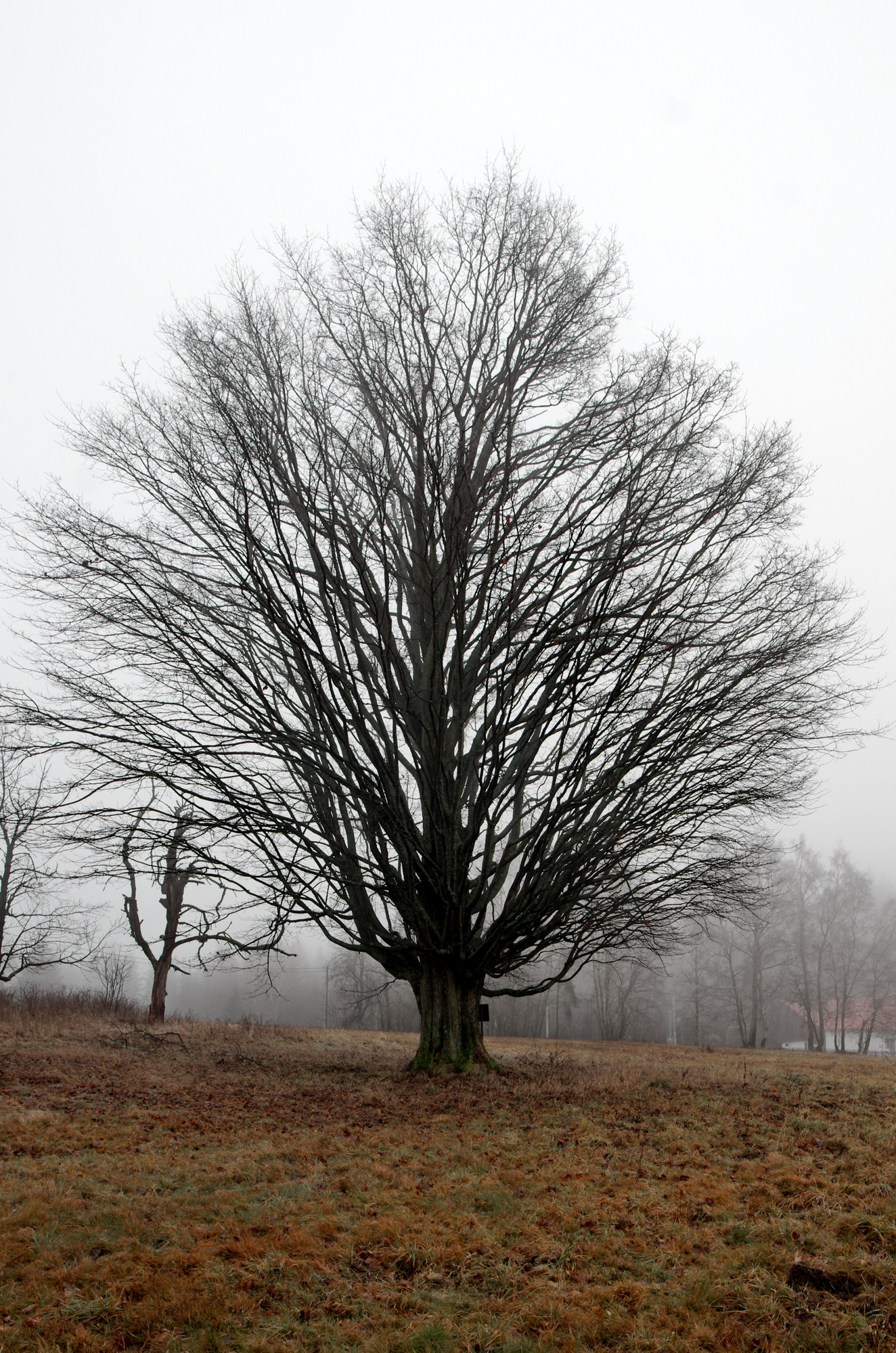 Památný strom Bernovský klen, Bernov, okres Sokolov